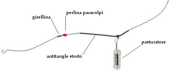 Legering